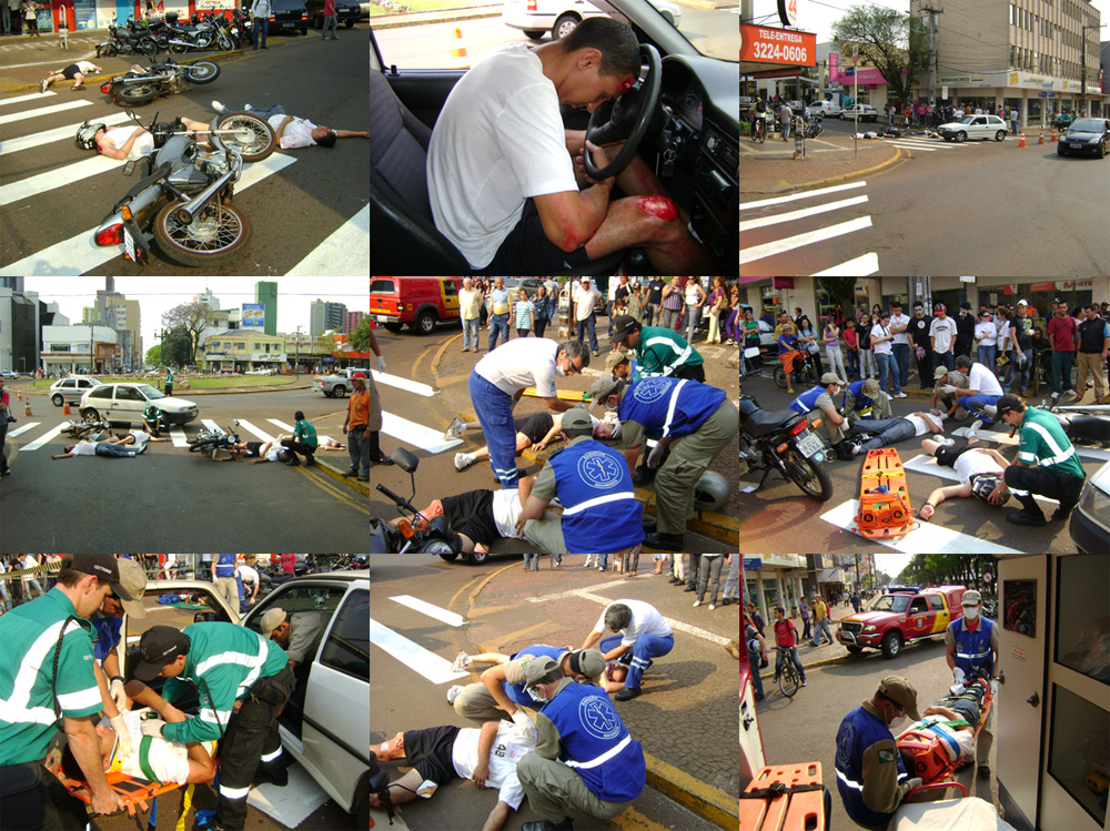 Treinamento de Atendimento Pré-hospitalar realizado na Semana do Trânsito em Cascavel, PR - 2010.